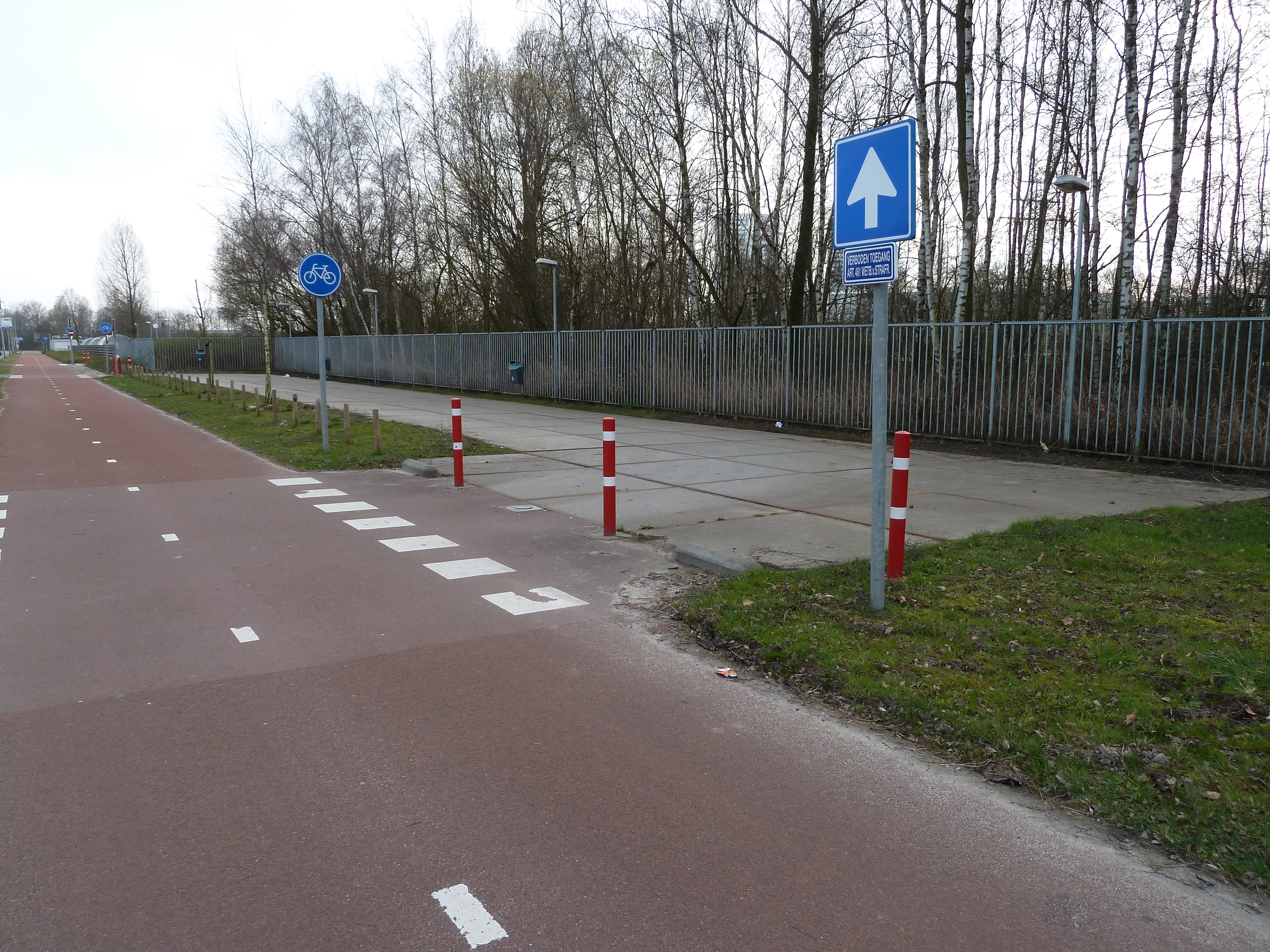 Parkeerplaats voor de omhangers van de tippelzone Groningen